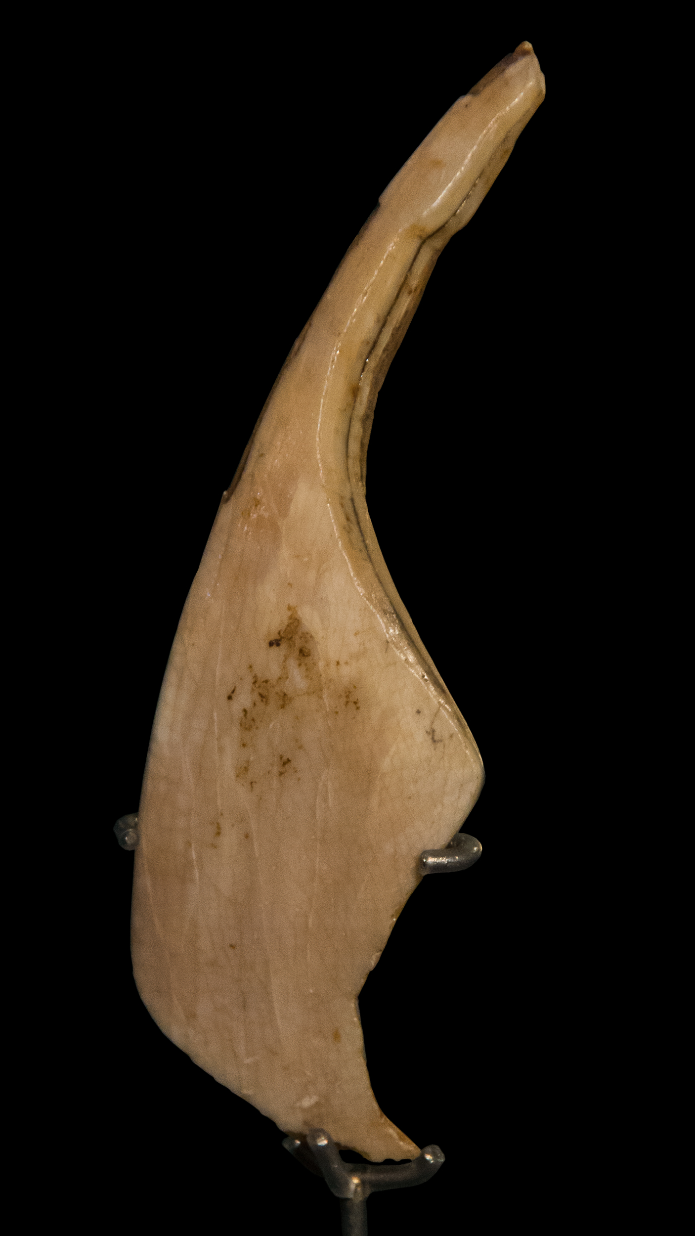 Die Venus vom Vogelherd. Venusfigurine aus einem Wildschweinzahn, gefunden 2008 bei der Nachgrabung im Aushub der Riek-Grabung von 1931 vor der Vogelherdhöhle. Magdalénien, Alter ca. 13000 Jahre.